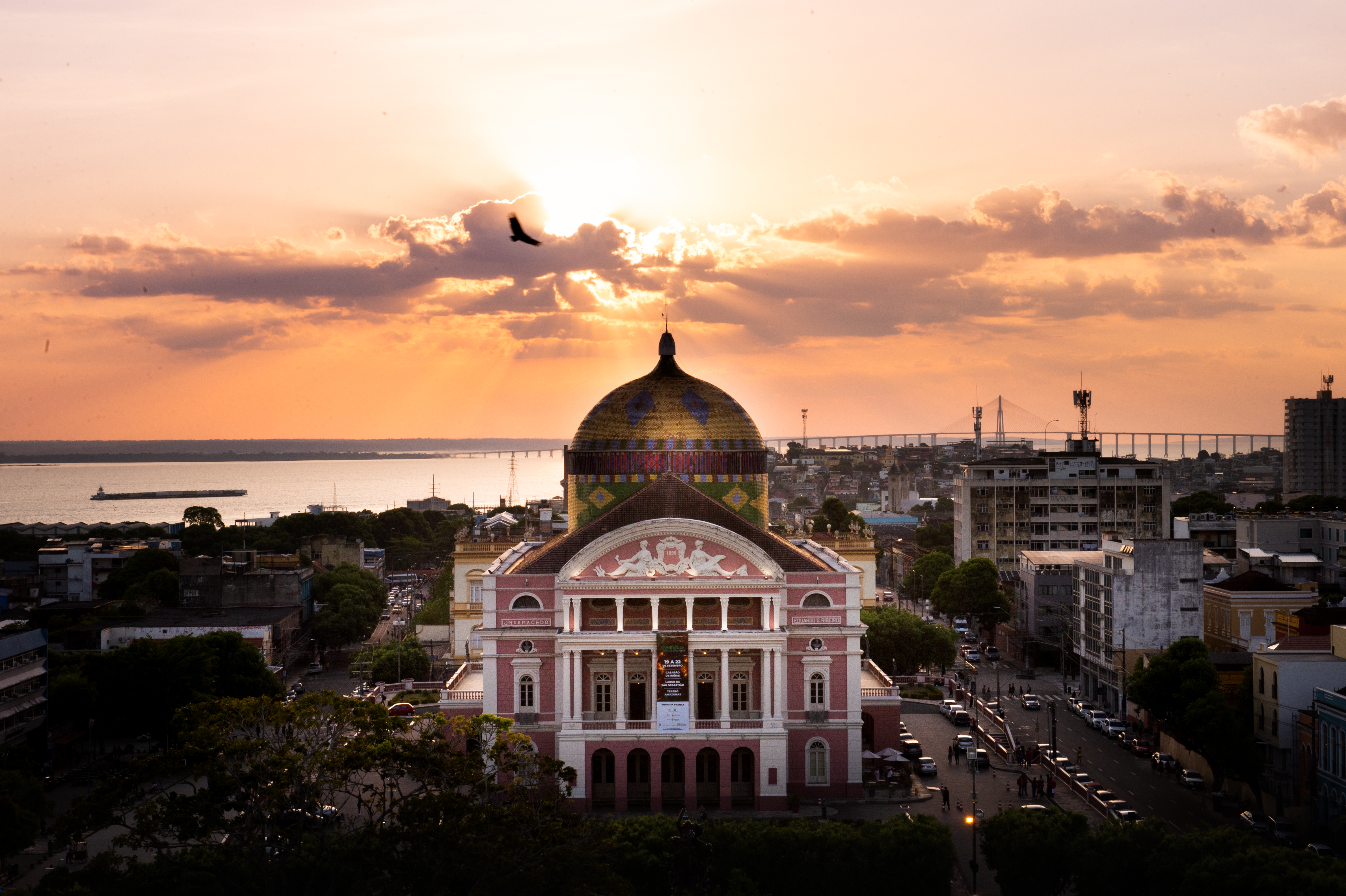 Manaus (AM), 7/10/2019 - Inaugurado em 1896, o Teatro Amazonas, primeiro bem tombado como patrimônio brasileiro no estado do Amazonas, vai receber investimentos para a sua conservação. Serão R$ 2,3 milhões para medidas de segurança e manutenção predial. Foto: Rafael Zart